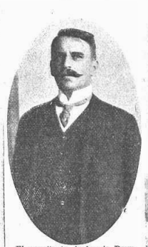 Ambrose Macdonald Poynter, arquitecto británico que realizó la Torre Monumental de Retiro.